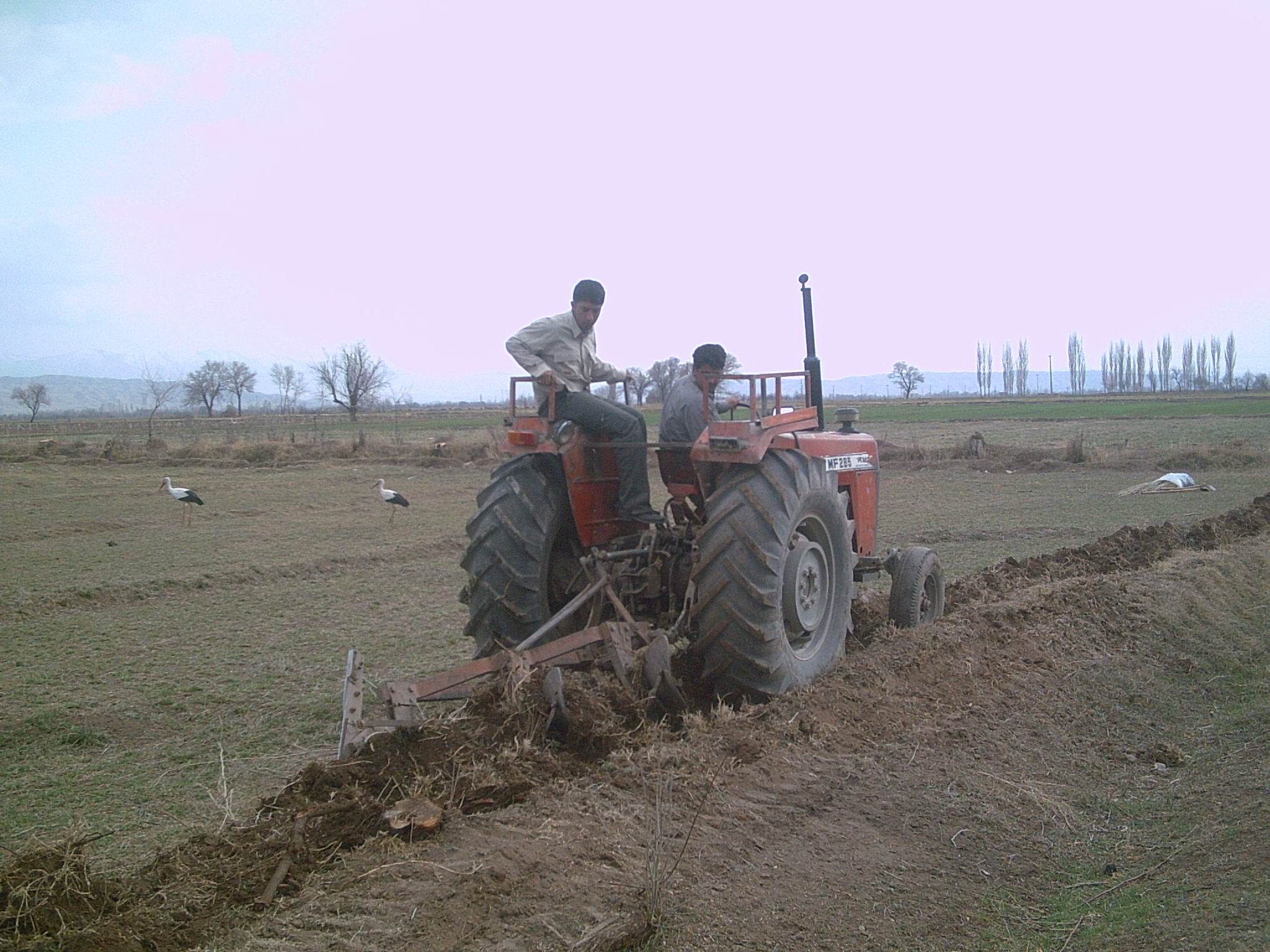 کشاورزان قزقلعه در حال شخم زدن زمین